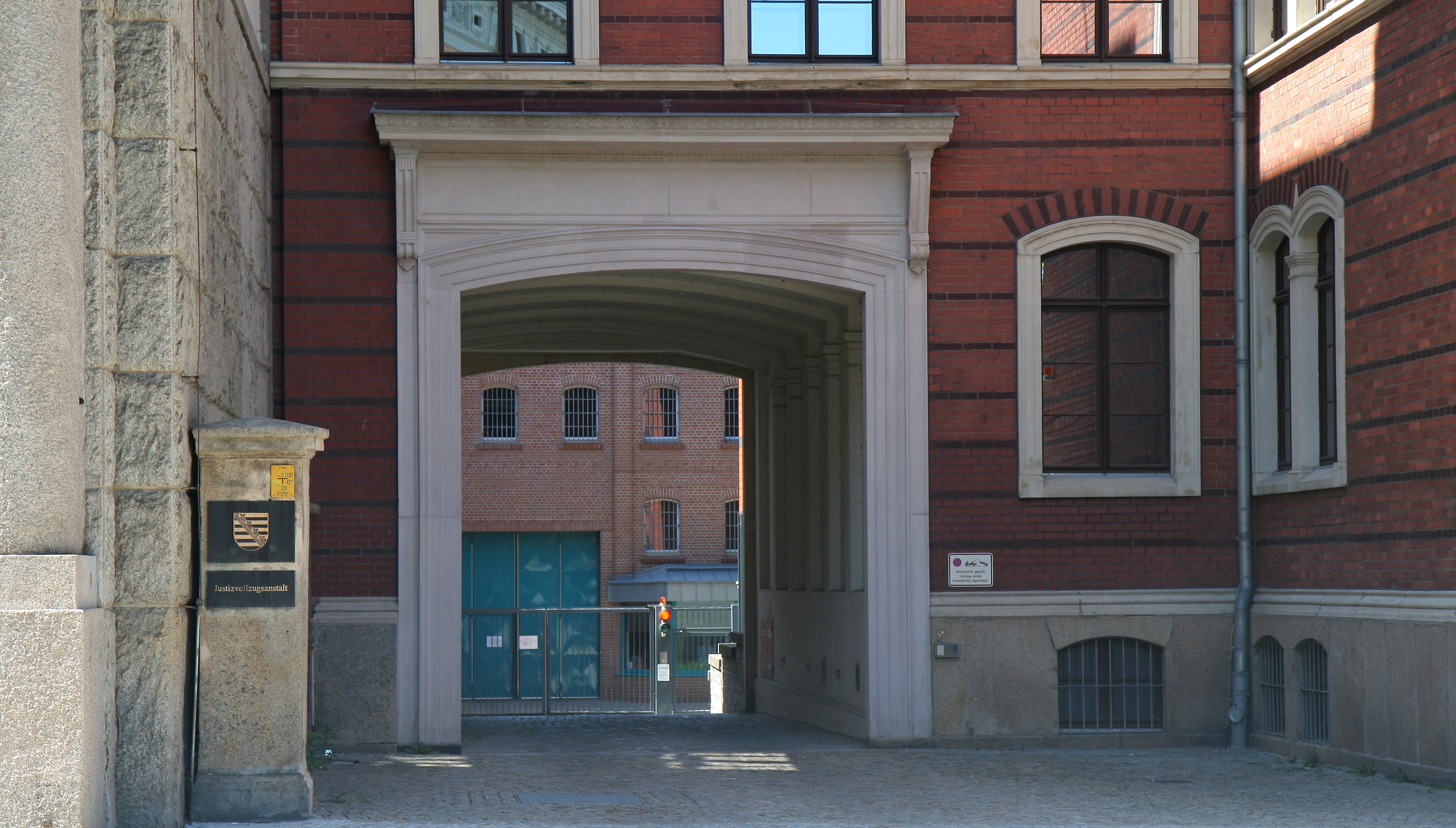 Eingangsbereich Postplatz 18 der Justizvollzugsanstalt Görlitz in Görlitz.